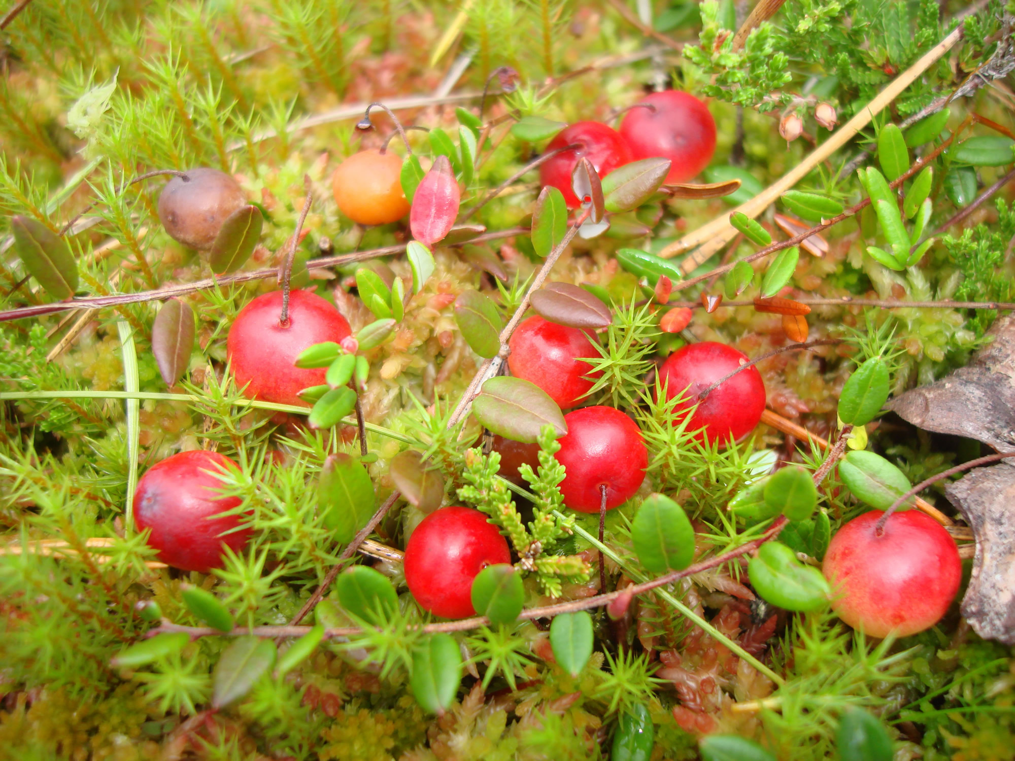 Nahaufnahme von Früchten der Moosbeere (Vaccinium oxycoccos).